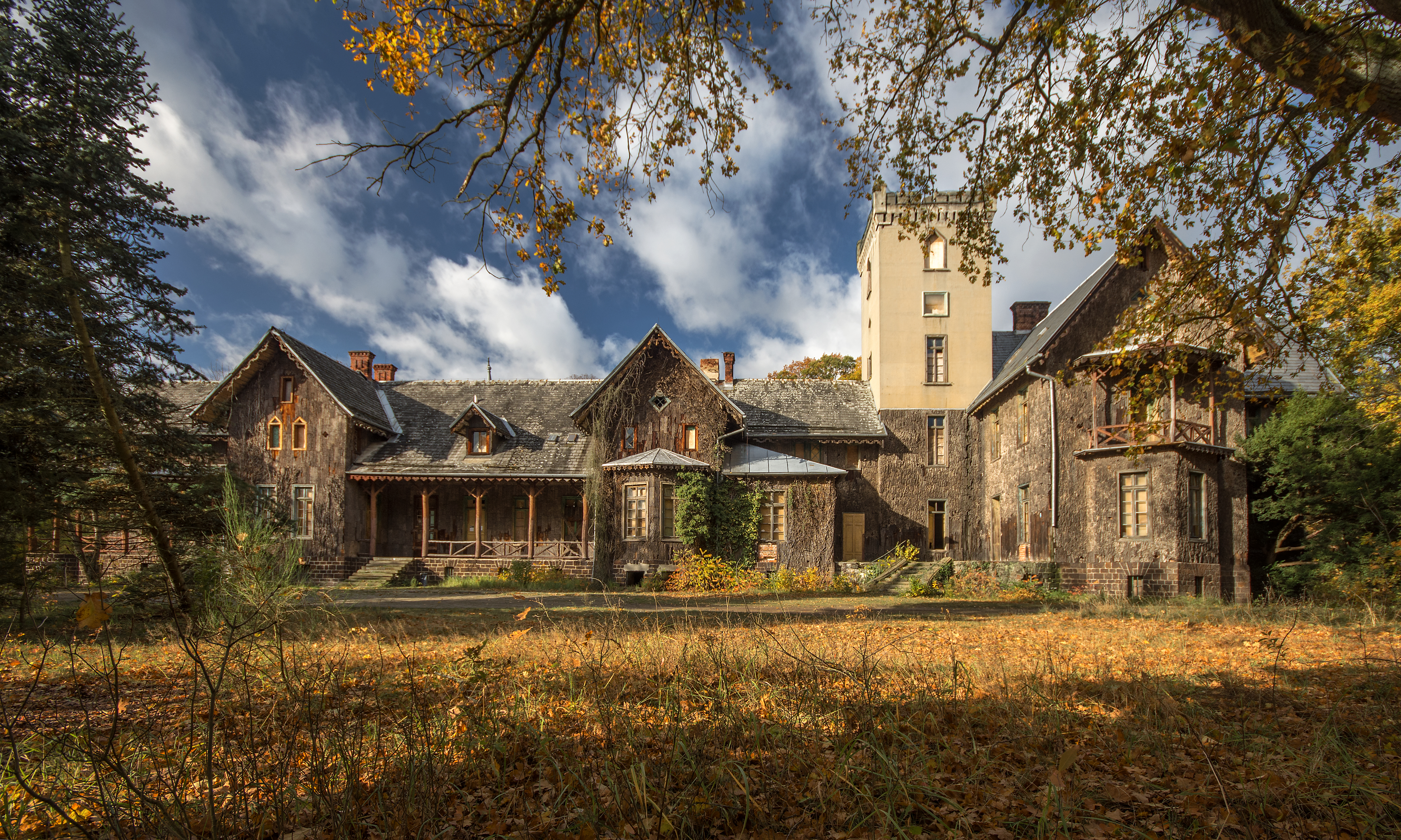 Moja Wola, pałac, 1825, 1907